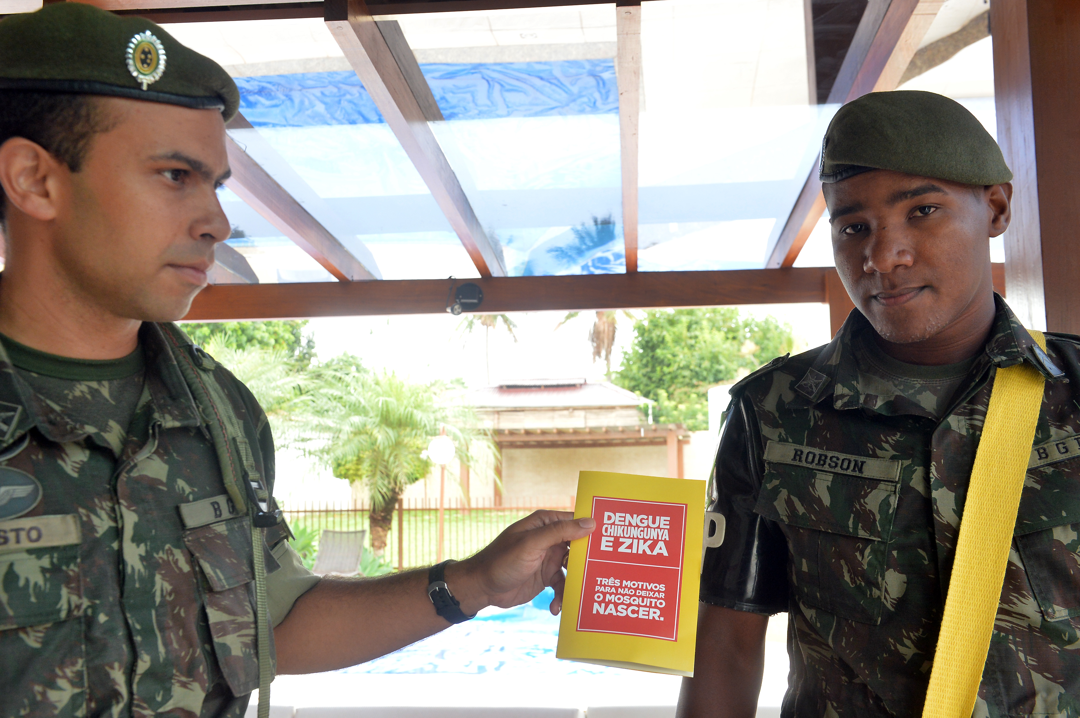 15/01/2016, Brasília - DF Fotos: Tereza Sobreira